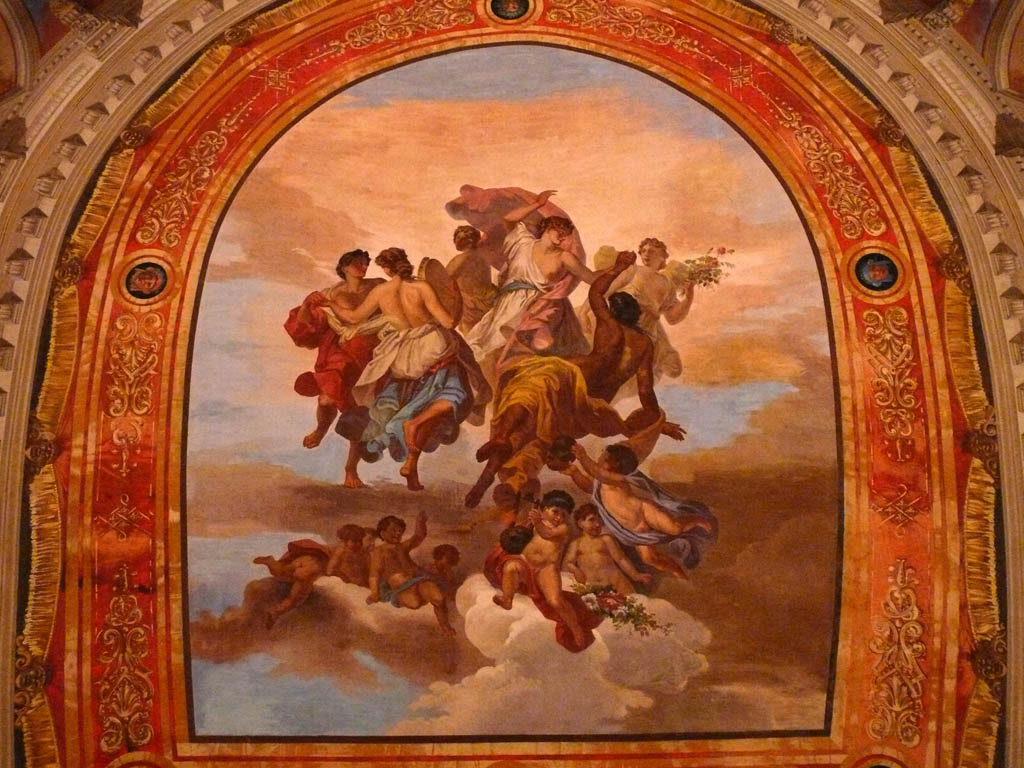 Bevagna, Teatro Comunale, fresco